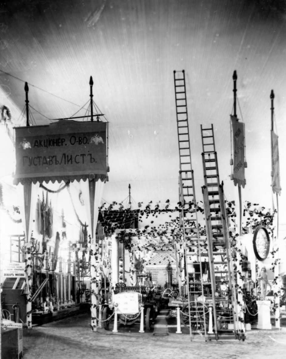 Международная пожарная выставка в Конногвардейском манеже, 19 мая 1912. 23. Экспонаты акционерного общества Густав Лист .jpg